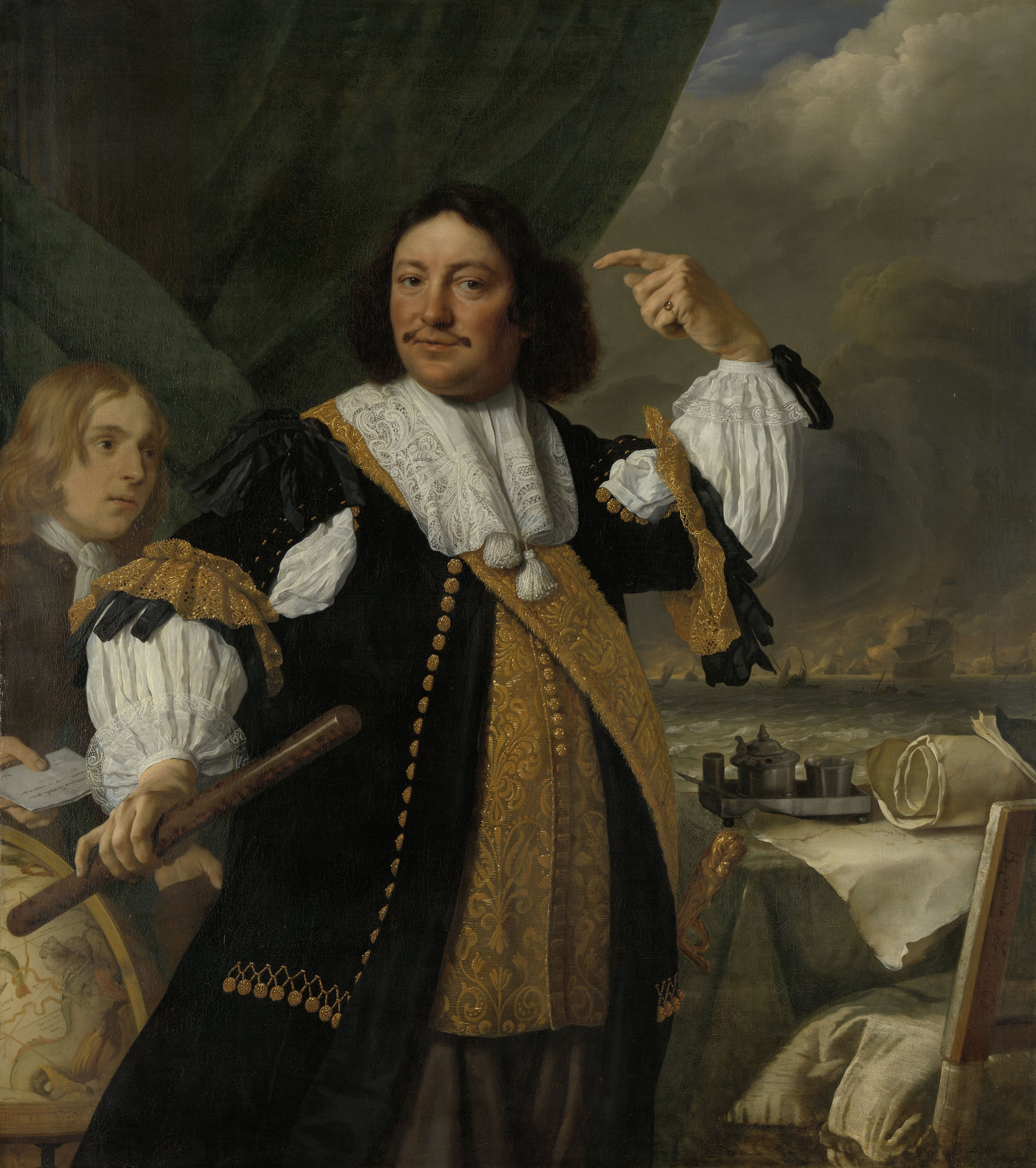 Pendant of File:Geertruida den Dubbelde, de echtgenote van luitenant-admiraal Aert van Nes, by Bartholomeus van der Helst.jpg